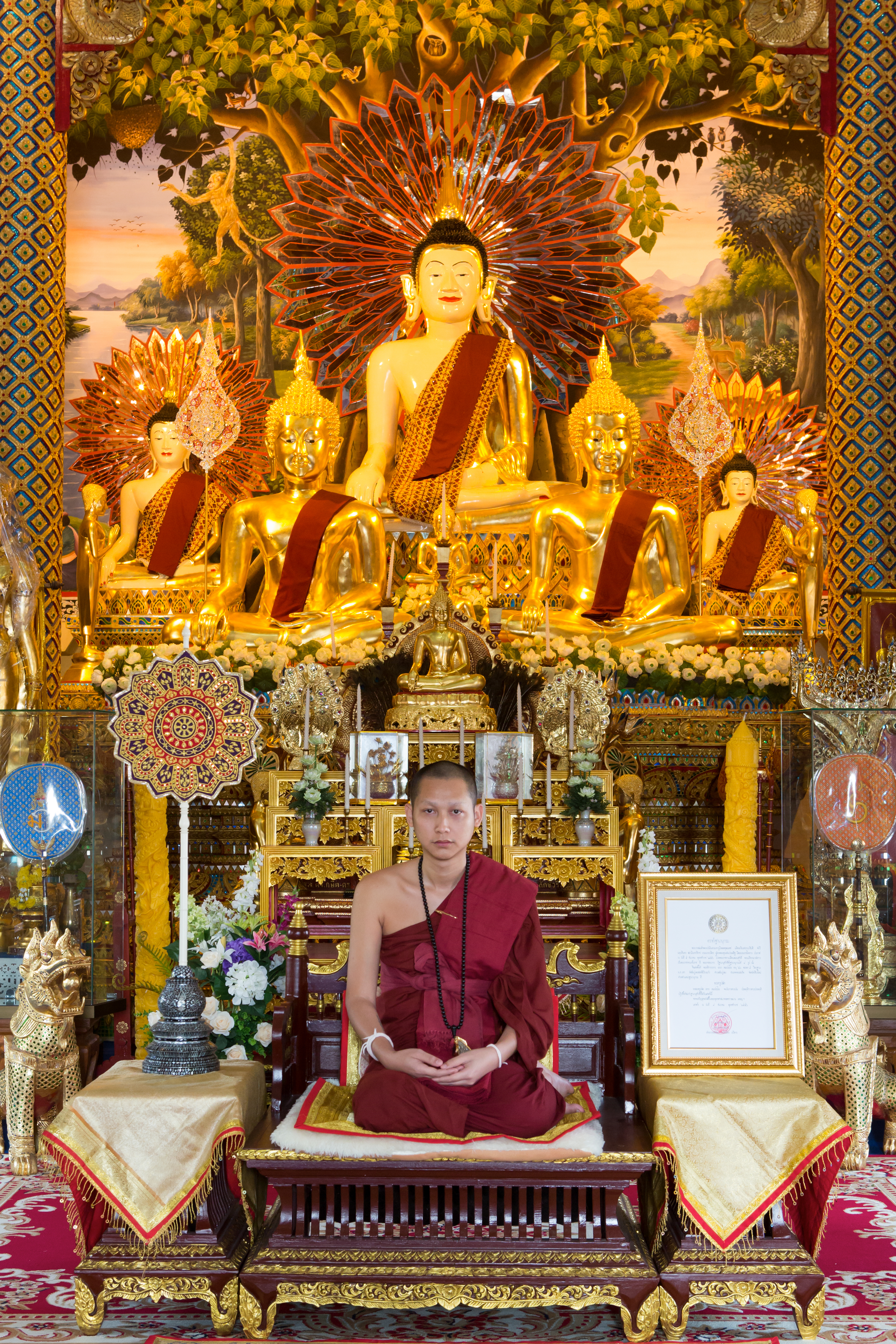 ภาพพระครูปลัดวรกร เขมปญฺโญ เจ้าอาวาสวัดสันปูเลยสะหลีเวียงแก้ว ถ่าคู่กับพัดยศฐานานุกรมประจำตำแหน่ง